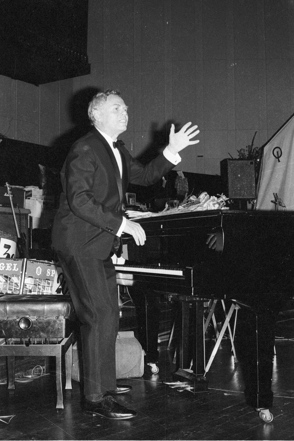 Schauspieler Karl John präsentiert sich als Sänger von Hans-Albers-Liedern.